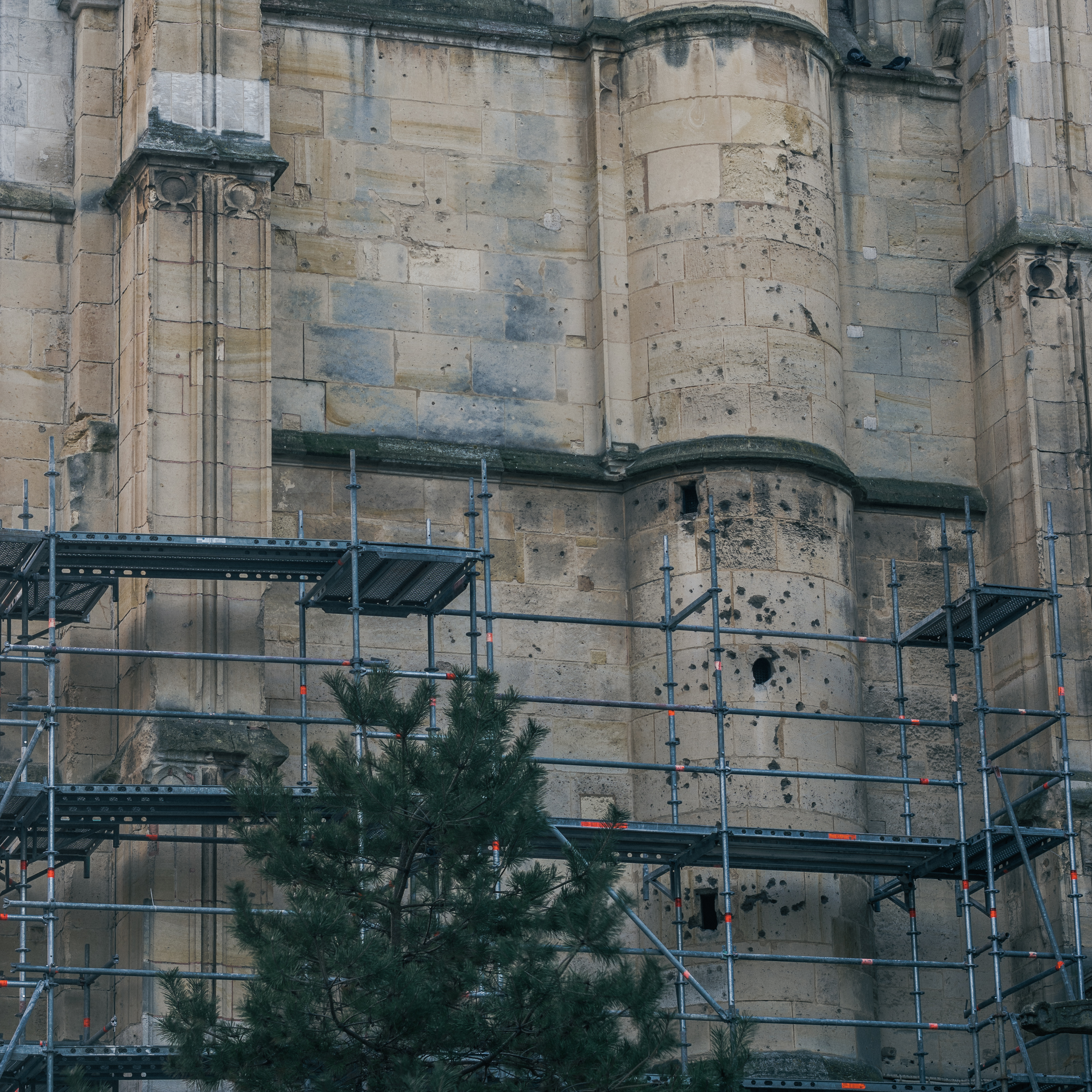 Façade est du clocher, criblé d'impacts de coup de feux, témoins des échanges de tirs entre catholiques réfugiés dans le clocher, et des huguenots à l'extérieur, visant les meurtrières.